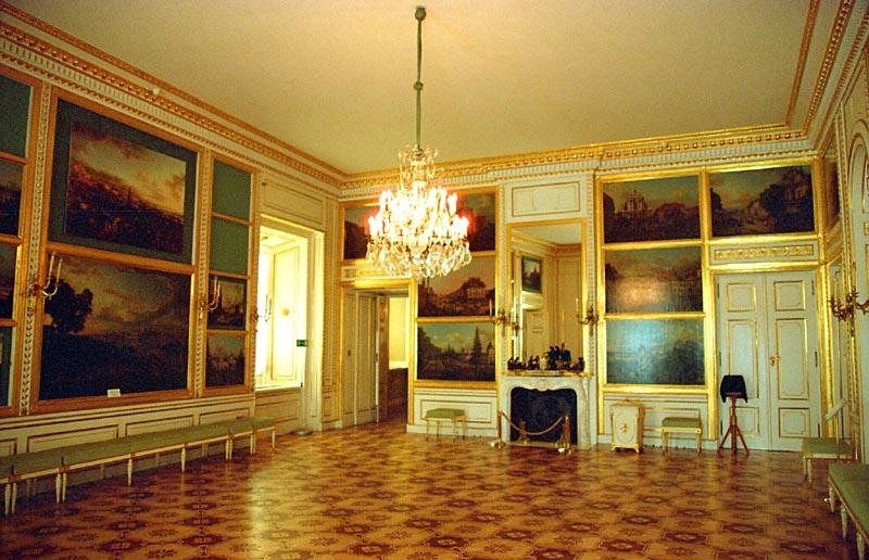 Warszawa (Polska)